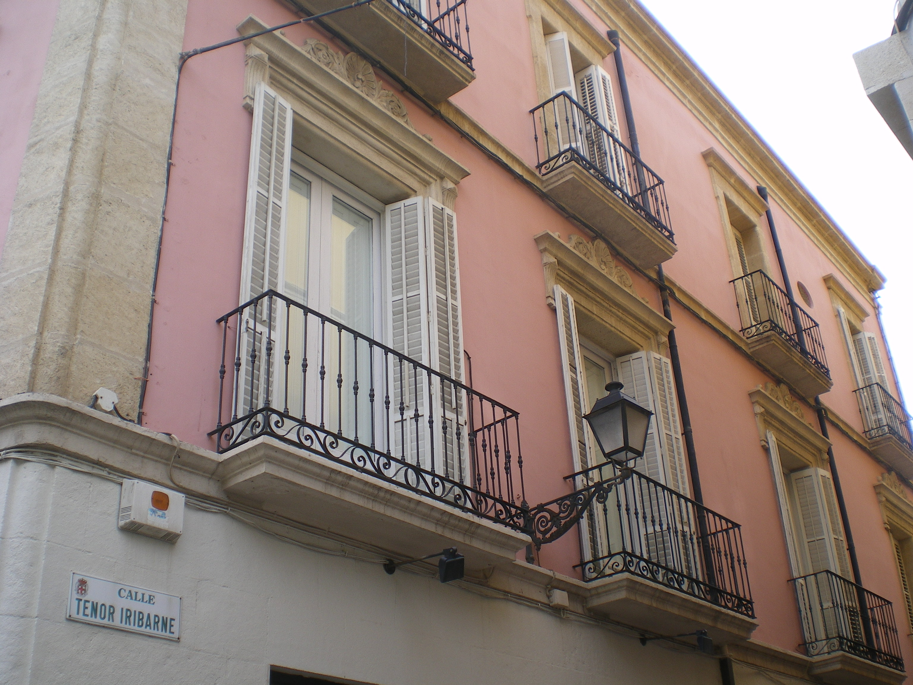 Calle dedicada al tenor almeriense Luis Iribarne O'Connor en su ciudad natal (Almería), en travesía del Paseo de Almería.